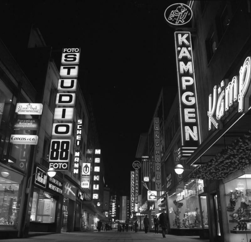 Köln: Nachtaufn. in der Hohe Strasse